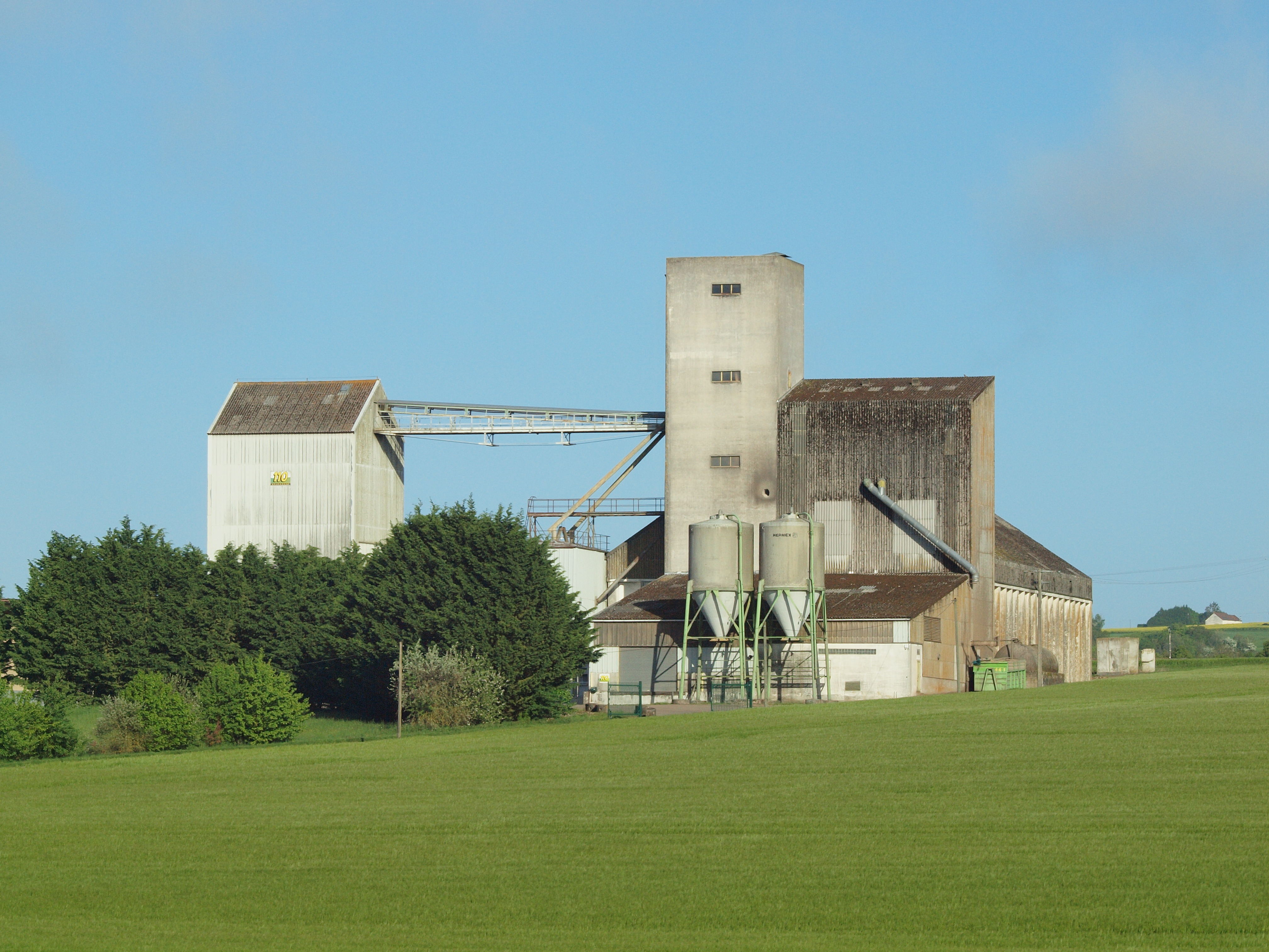 Silo céréalier de Thury (Yonne, France)